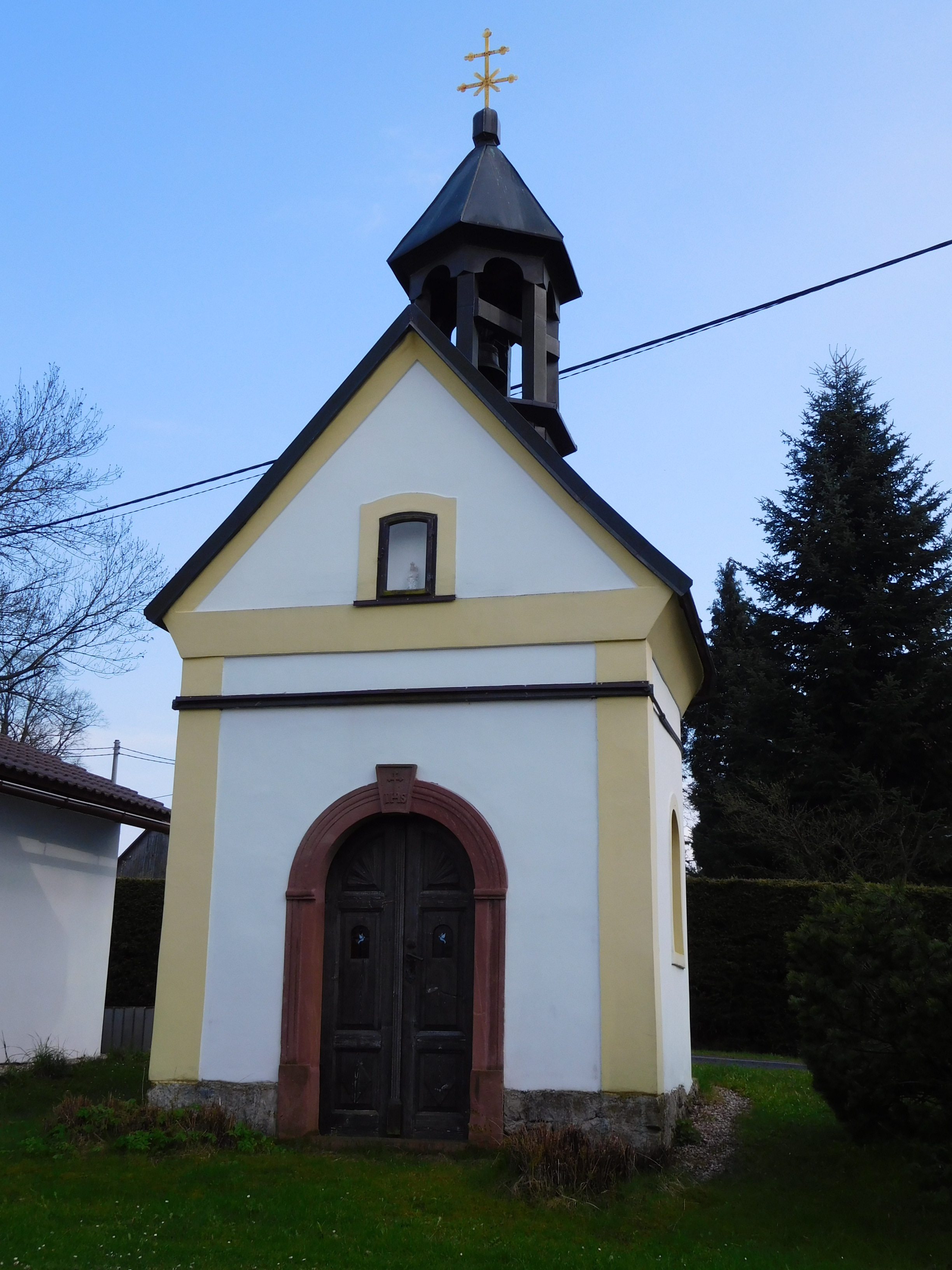 Čikvásky - Kaplička Nejsvětější Trojice